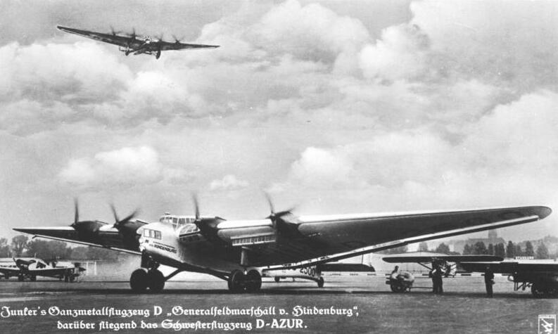 Junker`s Ganzmetallflugzeug D "Generalfeldmarschall v. Hindenburg", darüber fliegend das Schwesterflugzeug D-AZUR. In beiden fliegende Mitropa-Restaurants